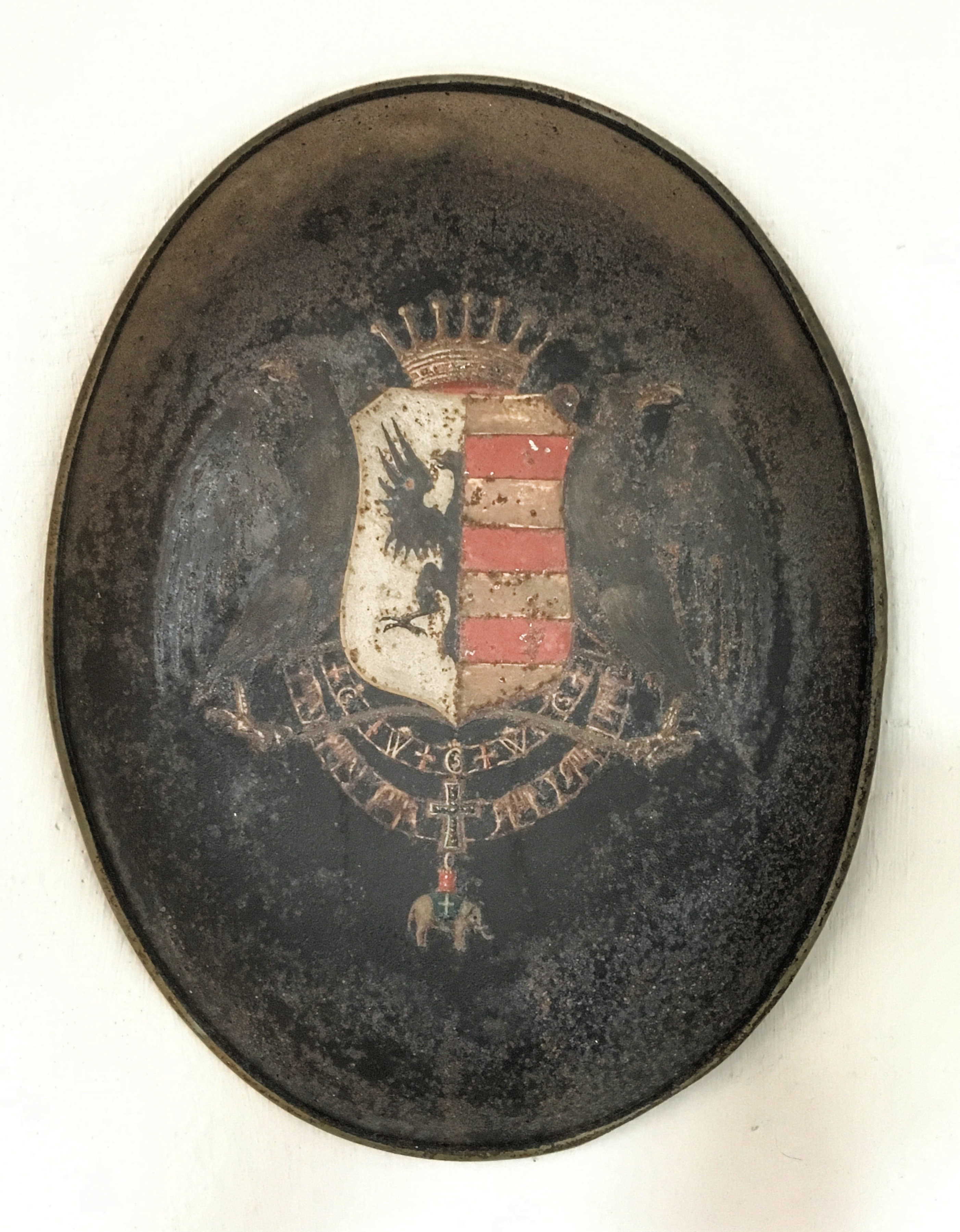 Adam Christopher von Holstens våben under en friherrekrone, lodret delt af hvidt hvori en halv ørn fast på delelingen, og gult, hvori tre røde bjælker. To ørne som skjoldholdere. Malt på blik, brugt til ligbegængelse. Holmens Kirkes Kapelsal, København